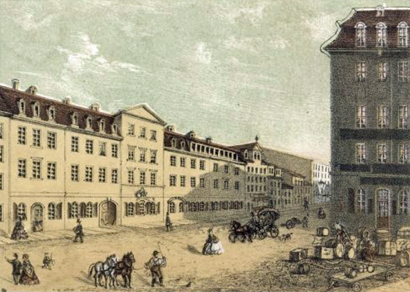 Das Haus "Goldener Bär" in Leipzig um 1850, farbige Lithographie (rechts der "Silberne Bär")